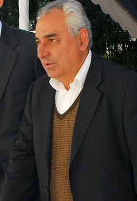 Ministro de Defensa Nacional de Uruguay, Luis Rosadilla.